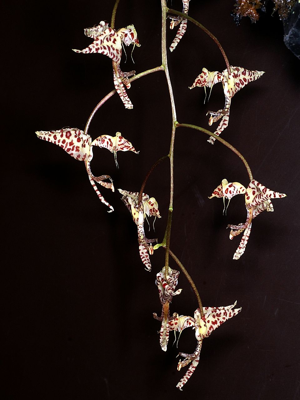 Gongora arcuata